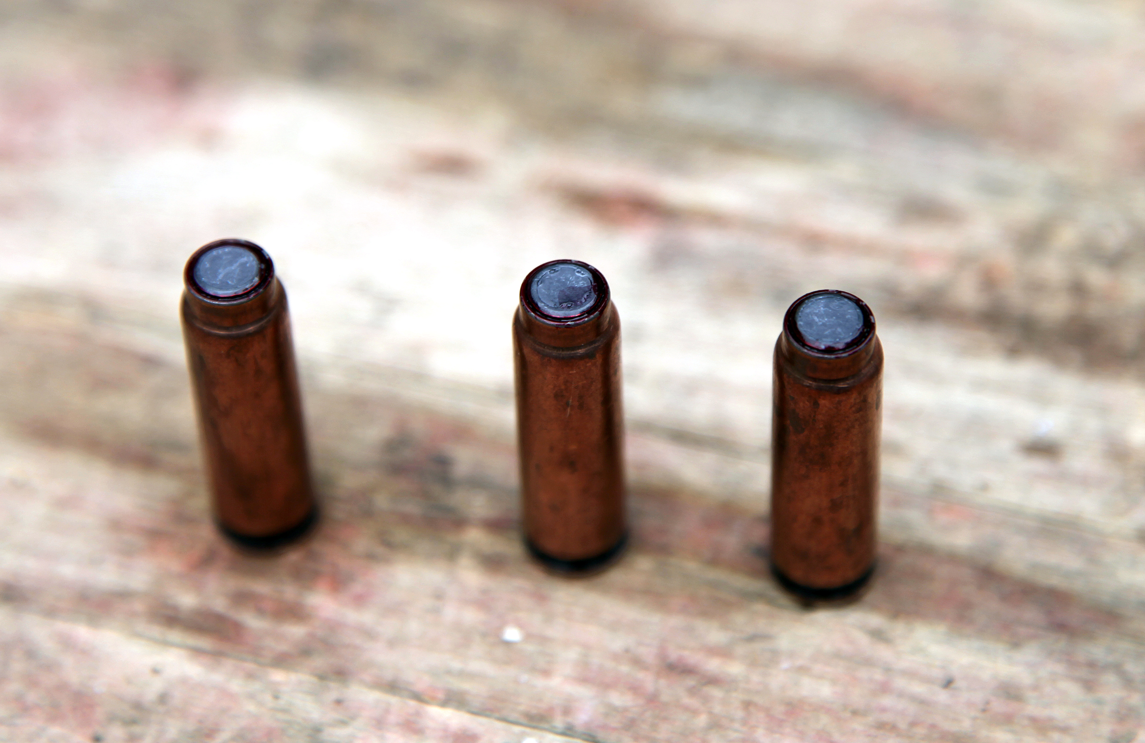 Патроны СП-4 до выстрела (SP-4 rounds before the shooting)